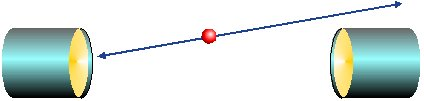 single PET event